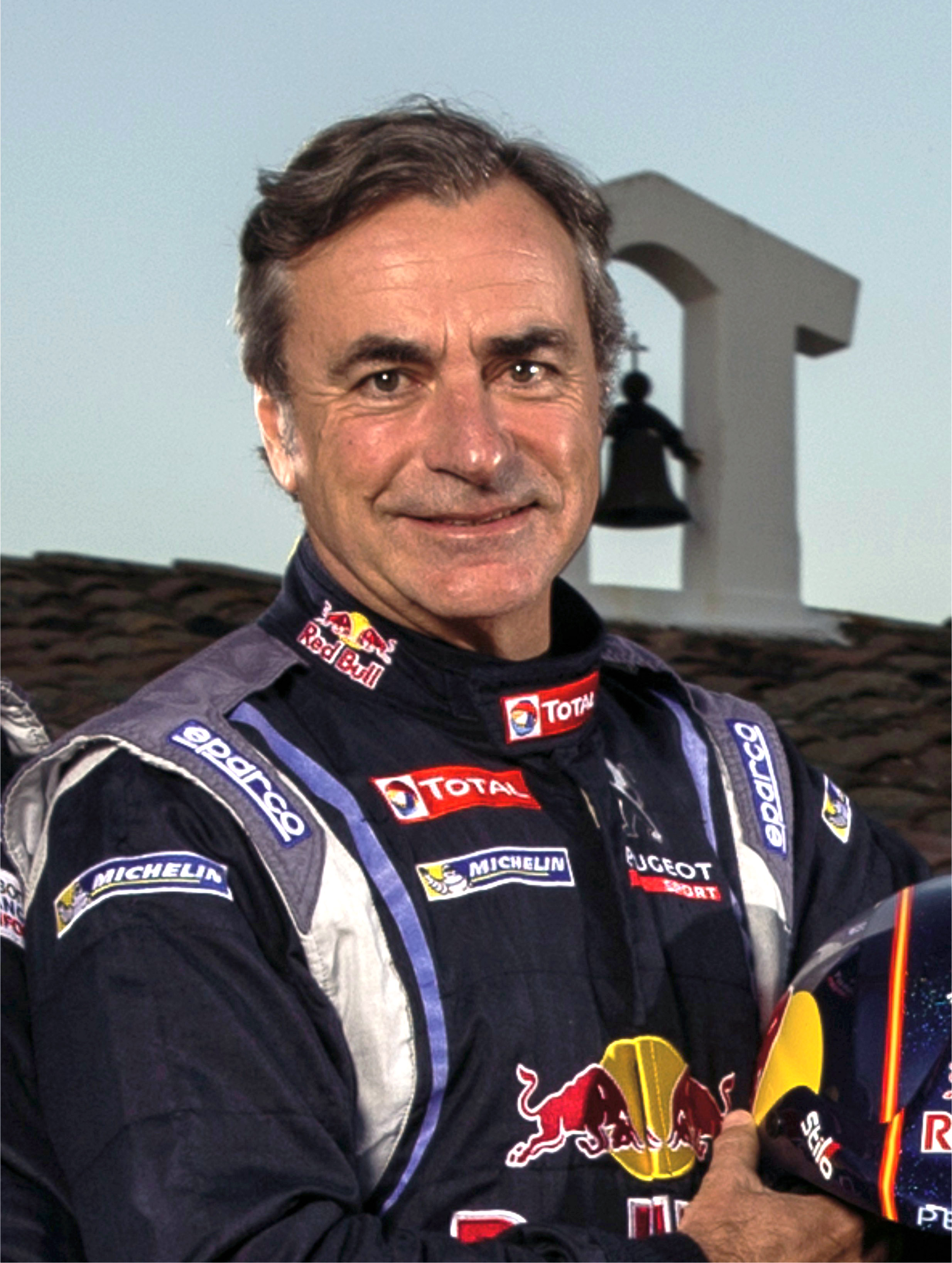 Carlos Sainz en 2014 con el equipo Peugeot del Rally Dakar.